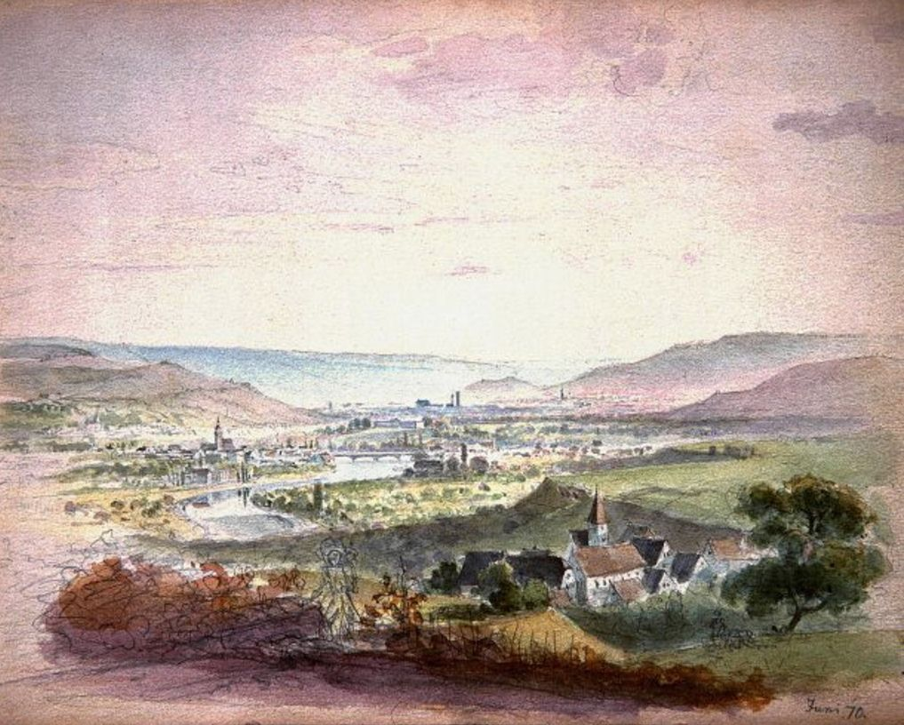 Neckartal, Blick von Norden. Links Cannstatt, rechts im Hintergrund Stuttgart. Vorne Münster. Aquarell, 27,5 x 38,5 cm; bei Schefold Nr. 8869c; 4. Skizzenbuch, Blatt 1 aus der Sammlung Prof. Dr. Ekkhard Kallee, Tübingen.